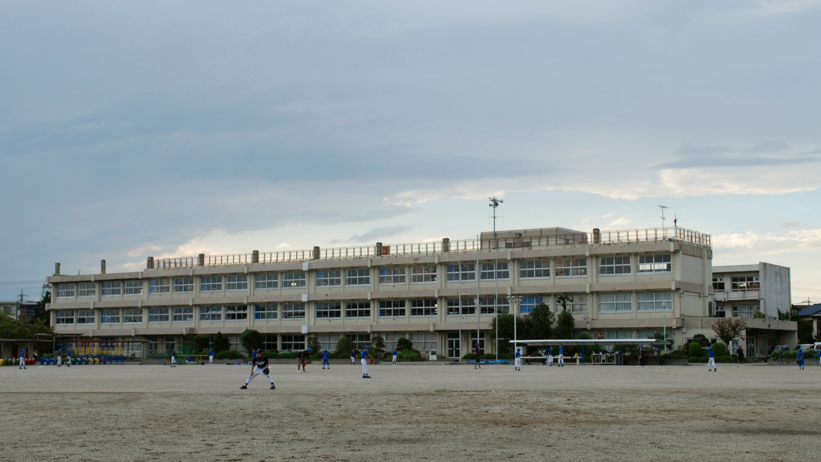 Ageo_Fujimi_Elementary_School